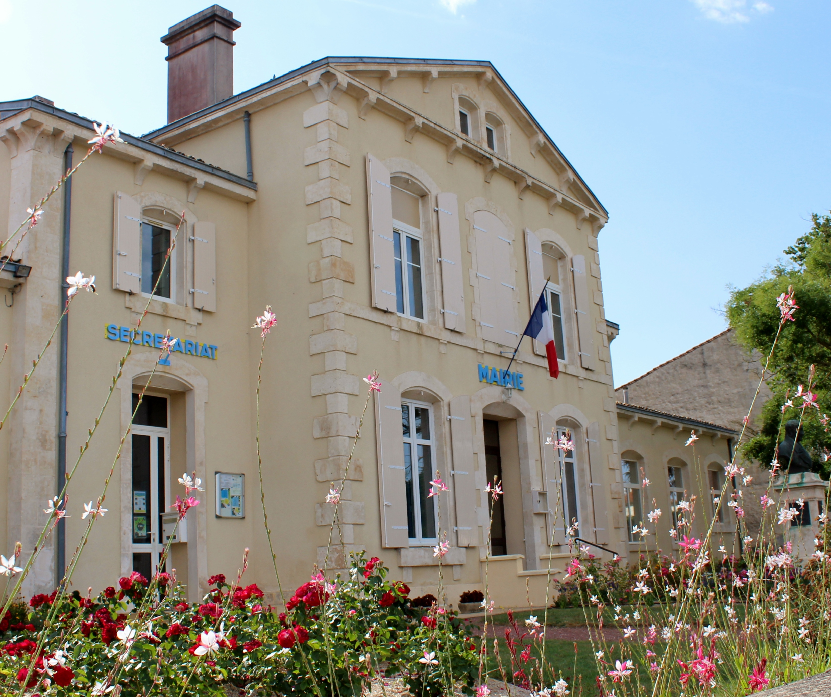 Mairie